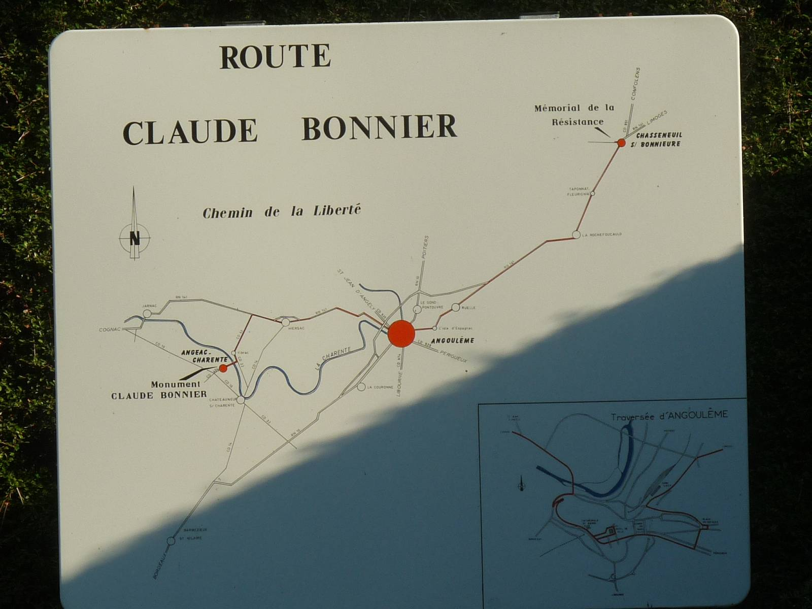 panneau départ de la route Claude Bonnier, Chasseneuil (16), France